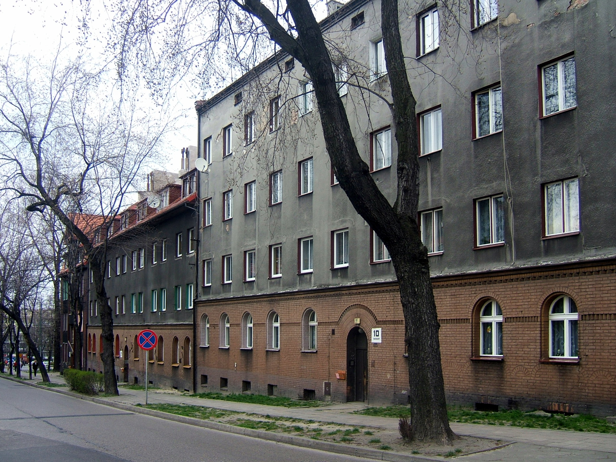 Wohnsiedlung der Hohenlohewerke in Kattowitz, von 1915 bis 1920 von Bruno Taut erbaut.